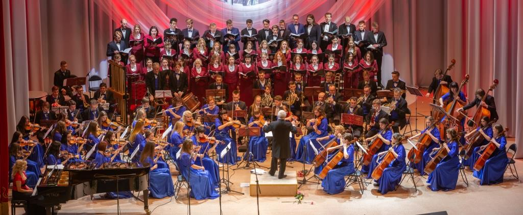 50-летний юбилей Заслуженного любительского коллектива Республики Беларусь симфонического оркестра Молодечненского музыкального колледжа имени М.К.Огинского